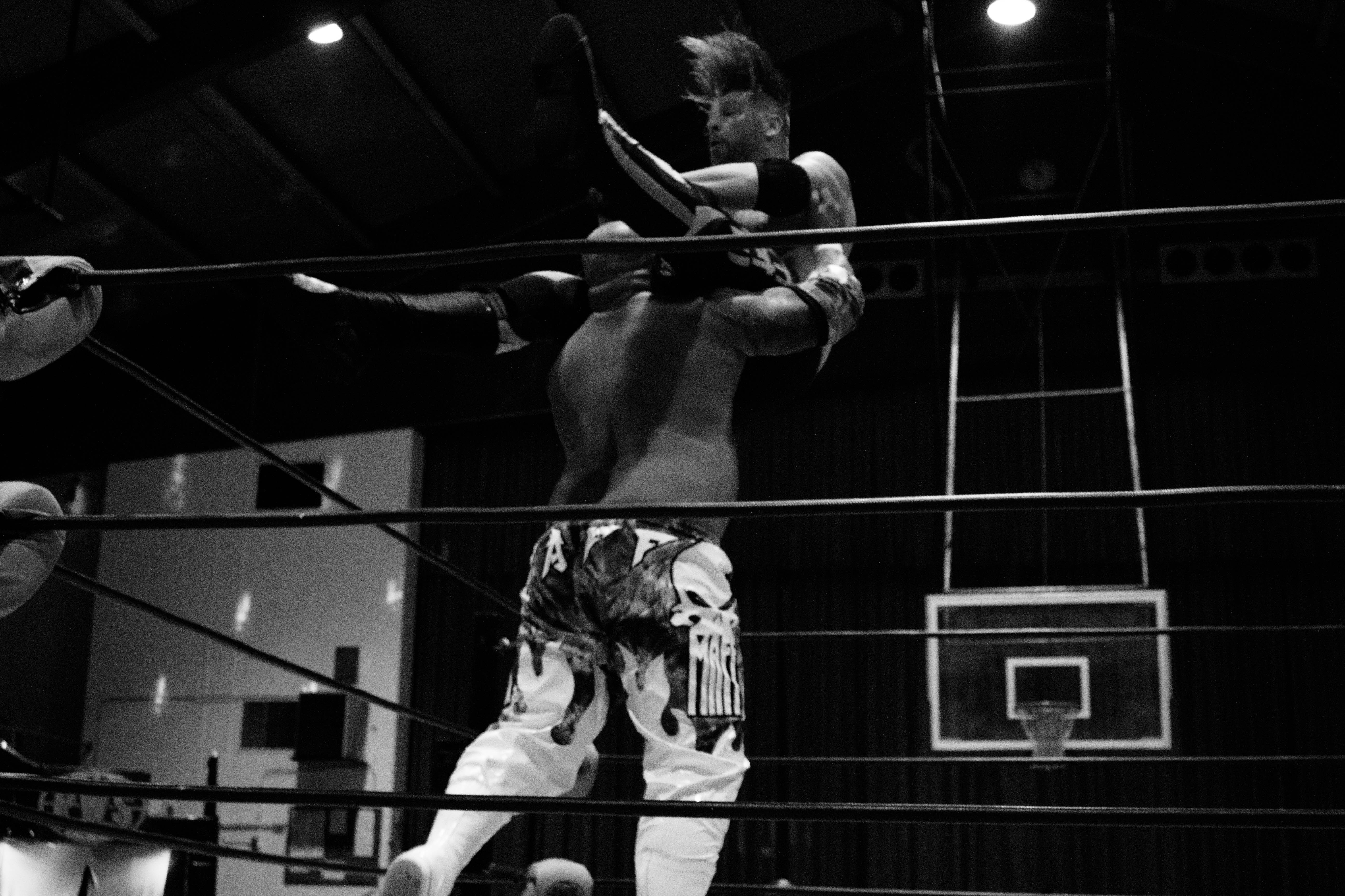 Le catcheur Dan Maff (de dos) exécutant une powerbomb sur Bryan Myers (assis sur les épaules de son adversaire).